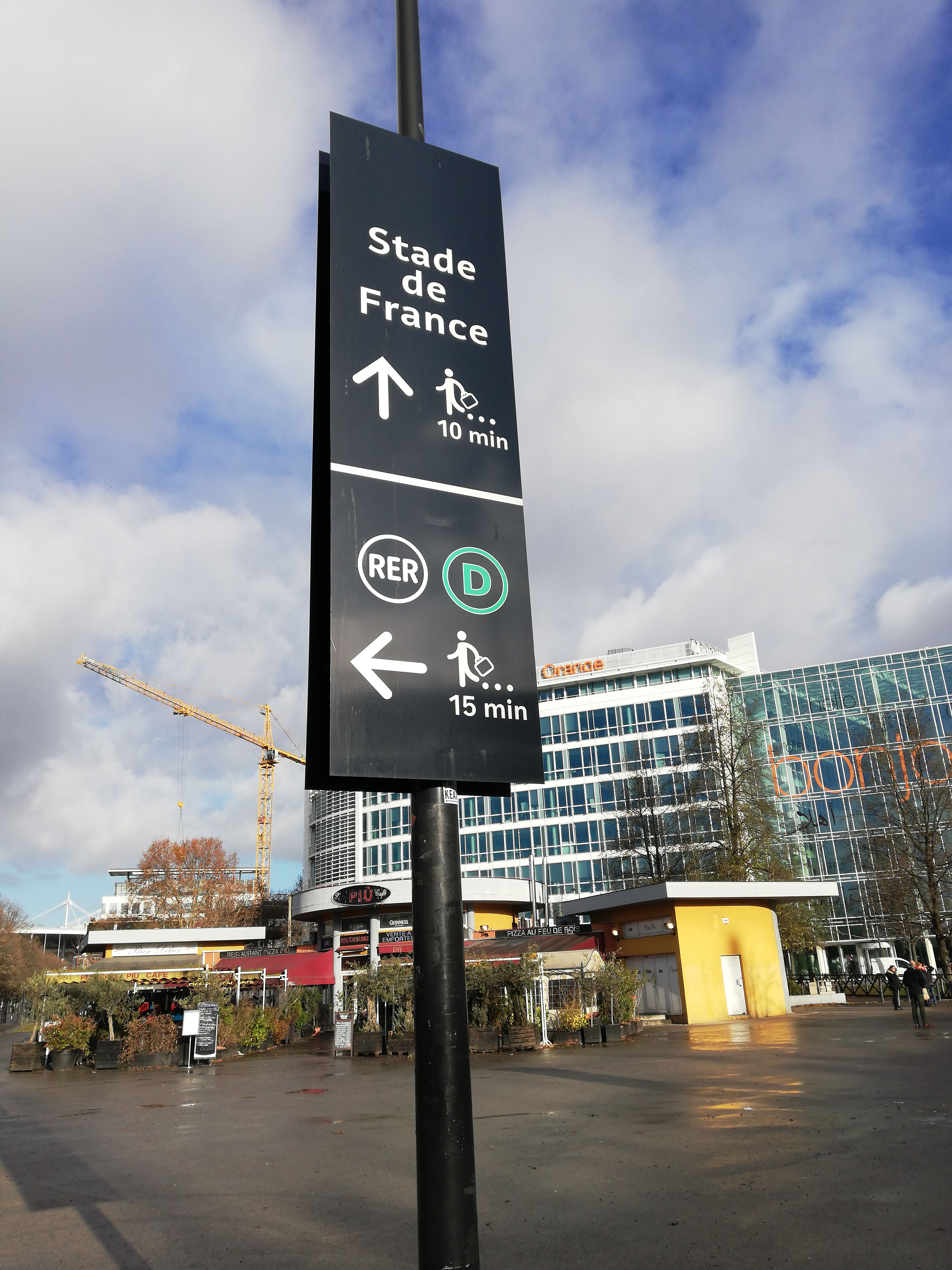 À la sortie de la gare de La Plaine - Stade de France, la correspondance avec la ligne D du RER (à la gare de Stade de France - Saint Denis) est indiquée bien que n'apparaissant pas sur les plans officiels de la ligne, en 2018.